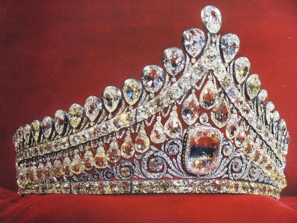 Диадема Елизаветы Алексеевны